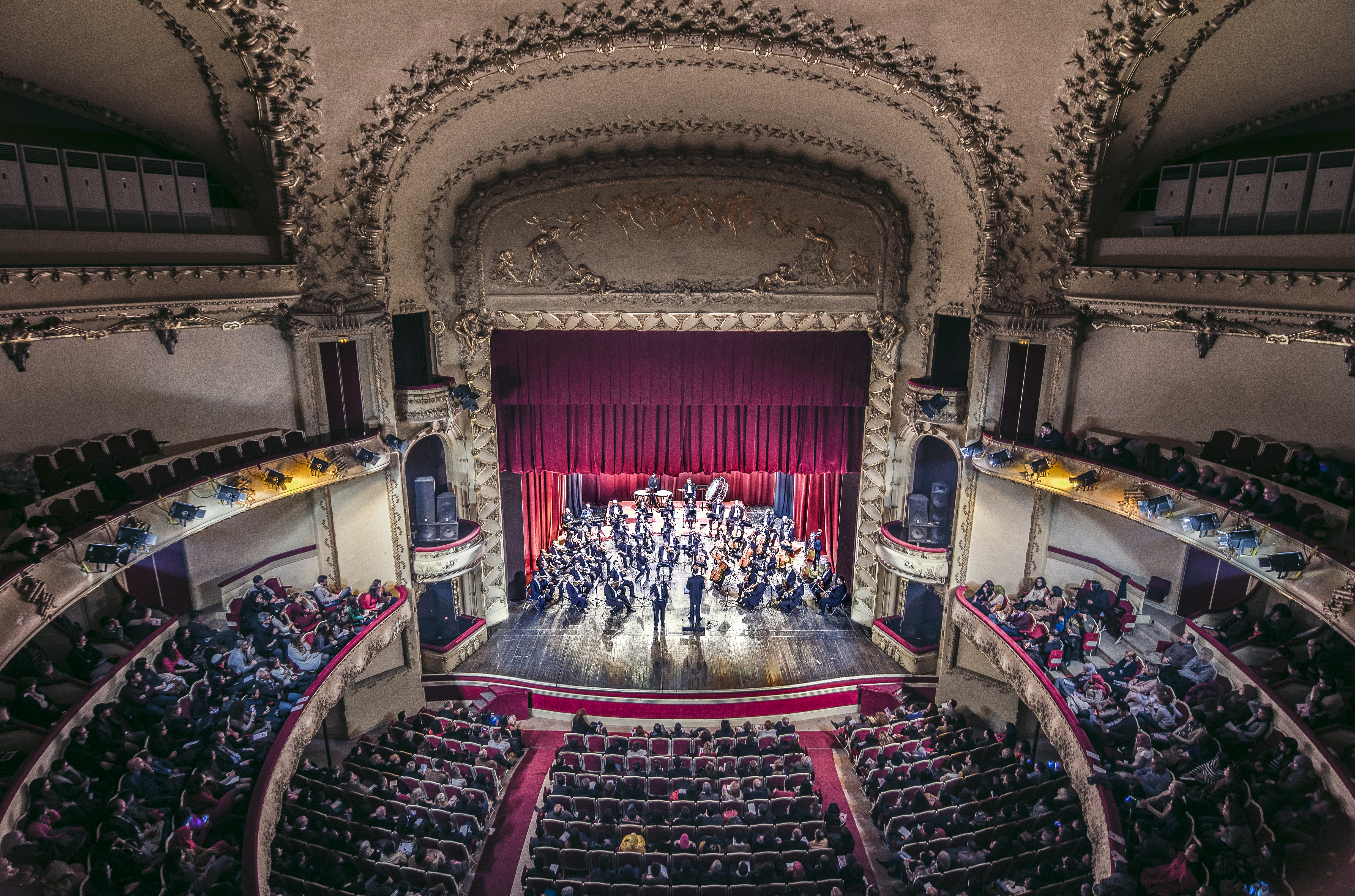 المسرح البلدي بمدينة تونس